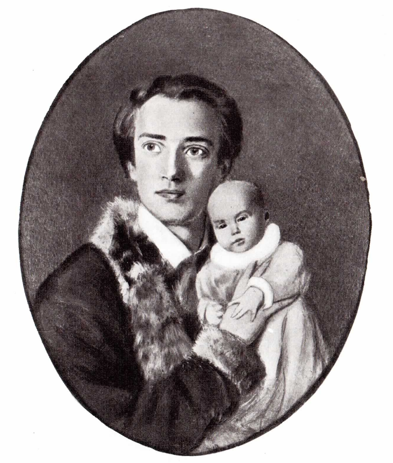 Александр Иванович Герцен с с сыном Александром